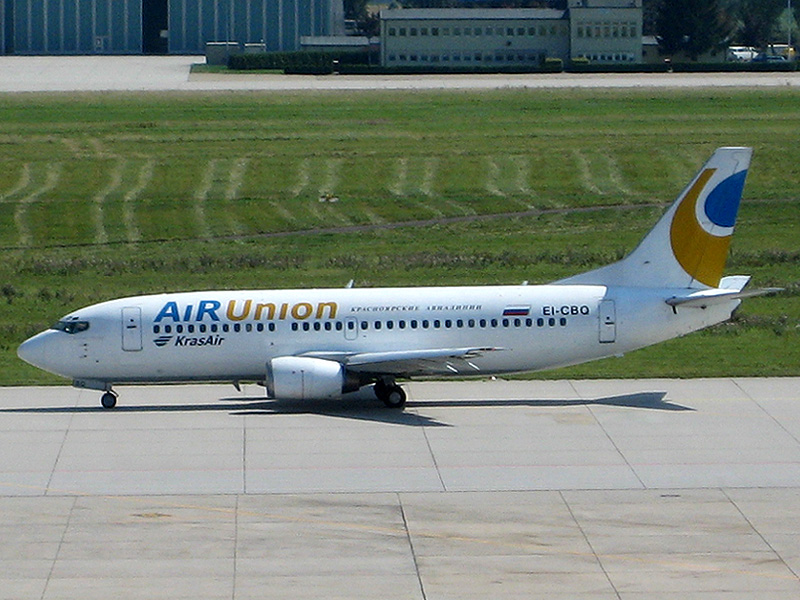 KrasAir / AiRUnion Boeing 737 EI-CBQ in Stuttgart.